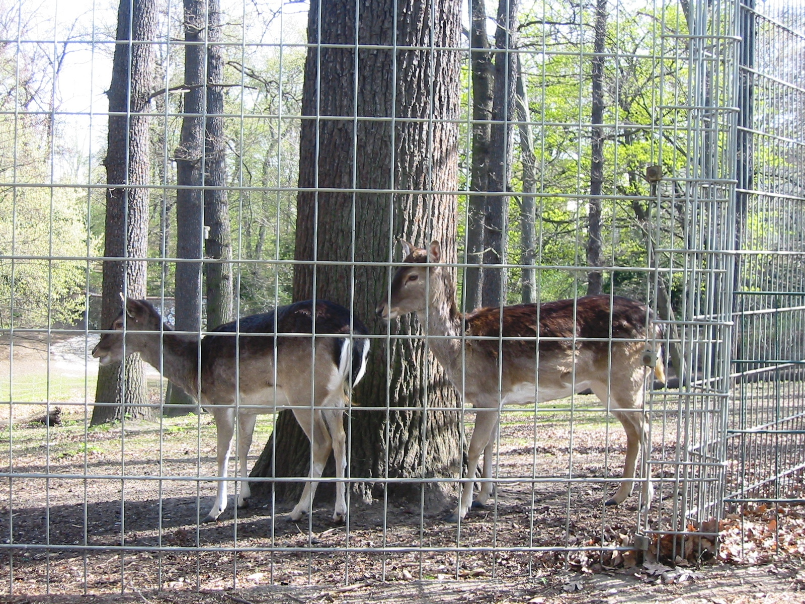 Damwild im Gehege des Franckeparks in Berlin-Tempelhof